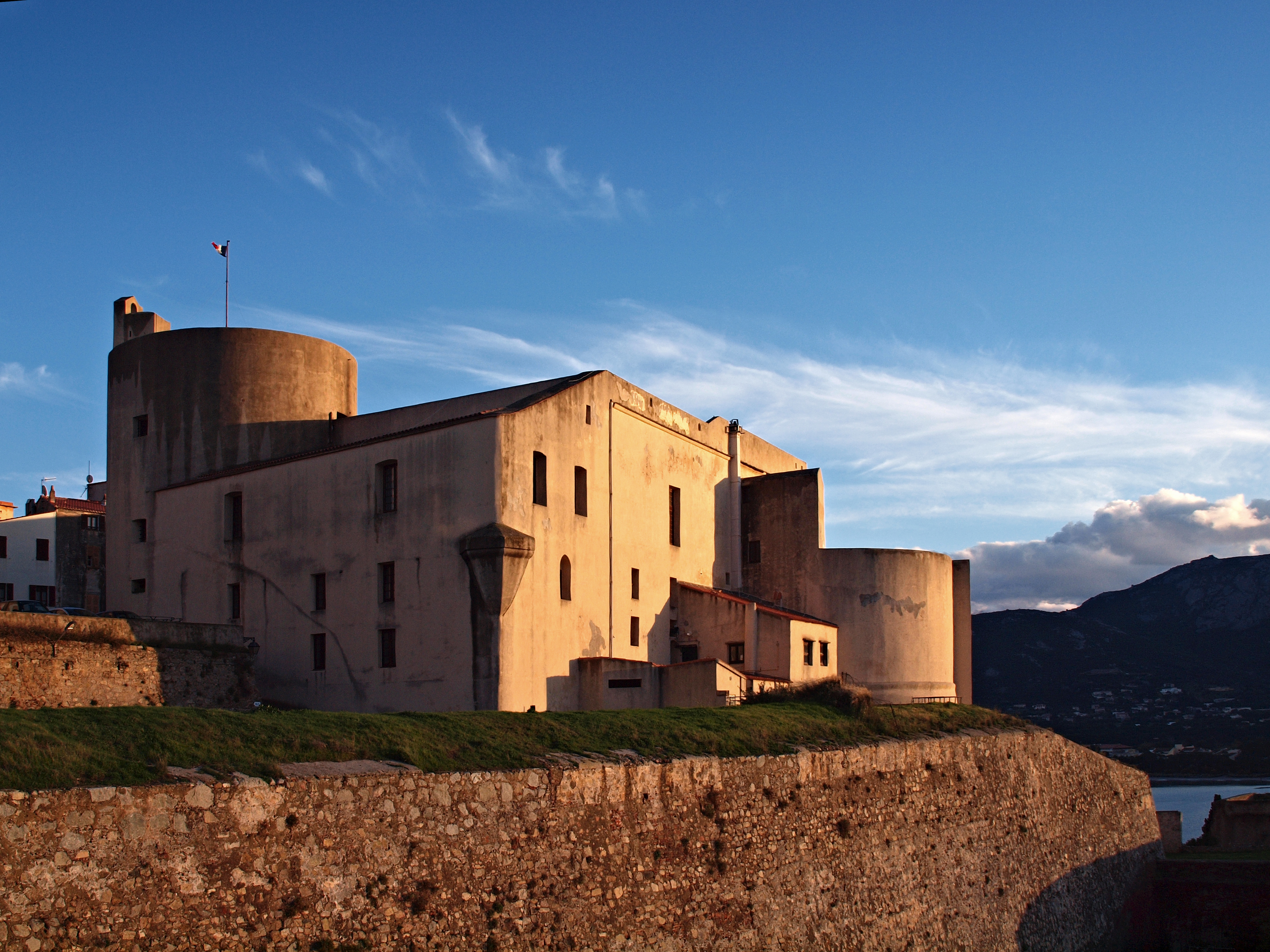 Calvi (Corsica) - Caserne Sampiero (2e REP), ex-Palais des Gouverneurs